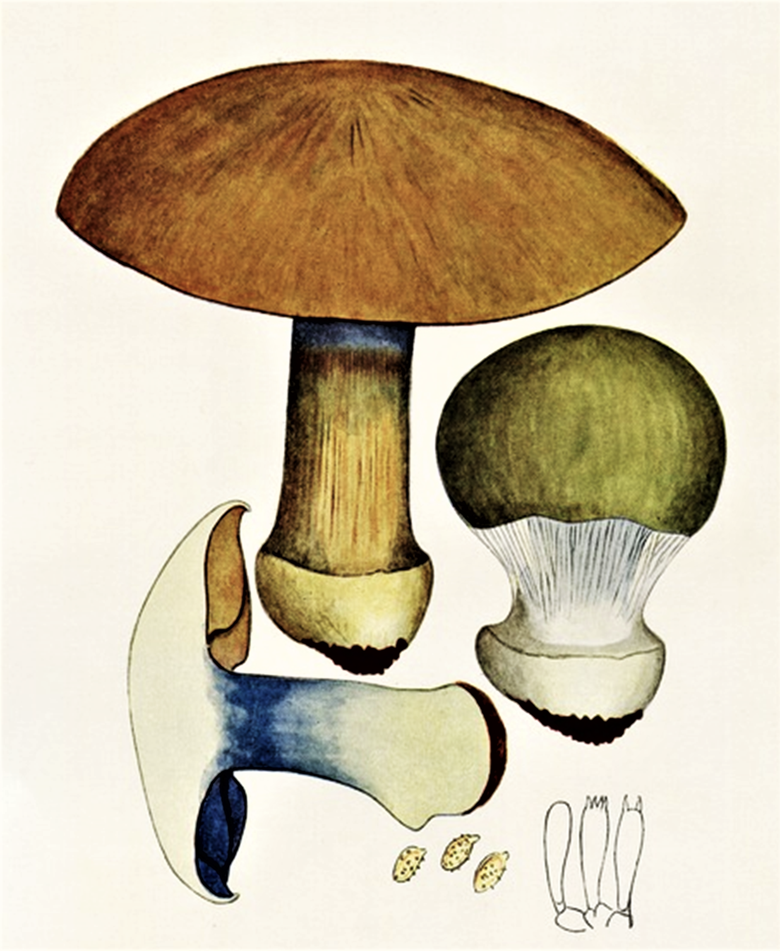 Giacomo Bresadola: Cortinarius glaucopus (Schaeff., 1774) Gray (1821)